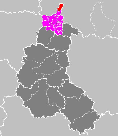 Maps of arrondissements and cantons of France: Arrondissement de Charleville-Mézières - Canton de Givet.PNG